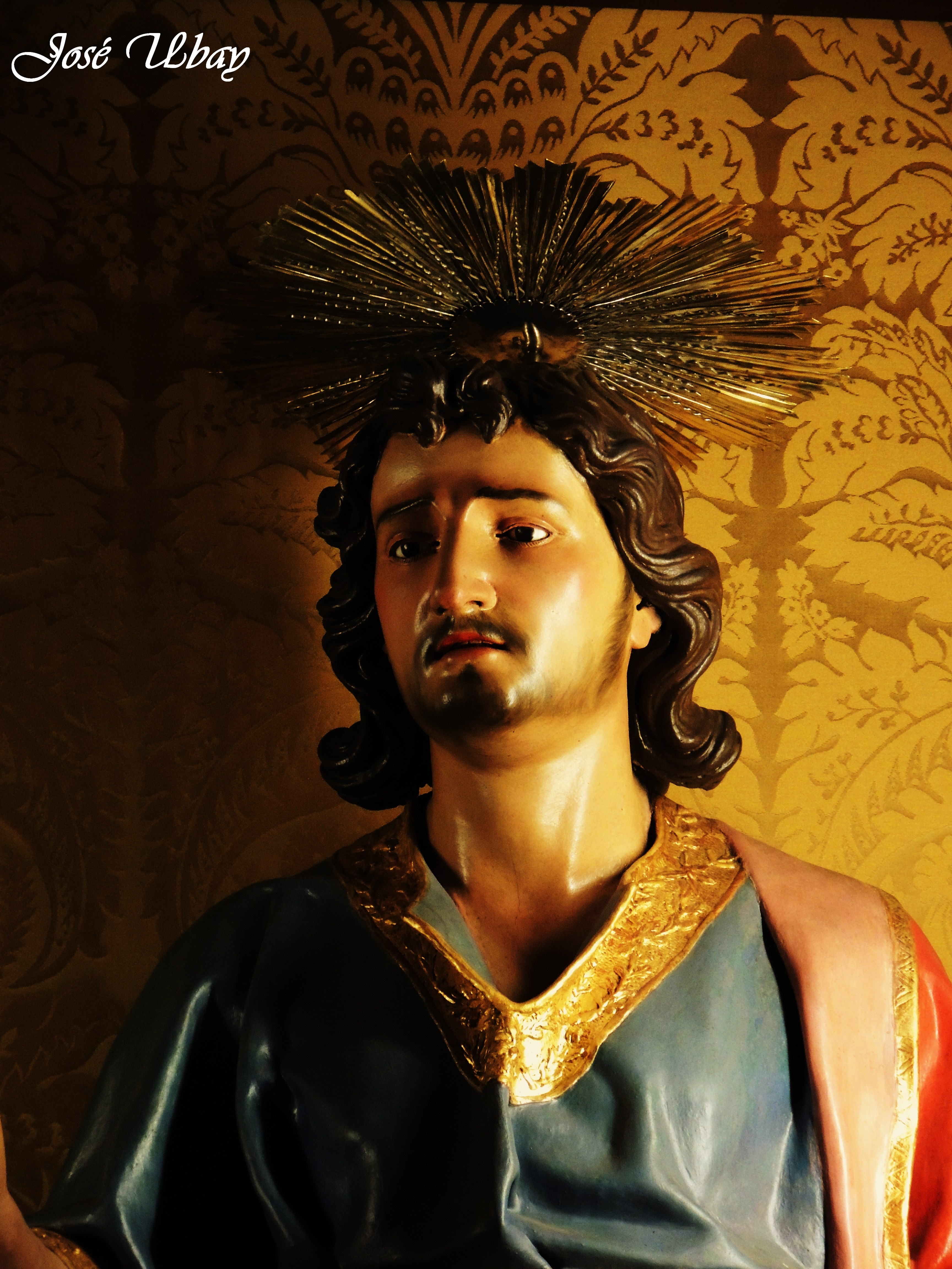 San Juan Apóstol y Evangelista (1799). José Luján Pérez. Parroquia Matriz de Nuestra Señora de la Concepción. Villa de La Orotava.